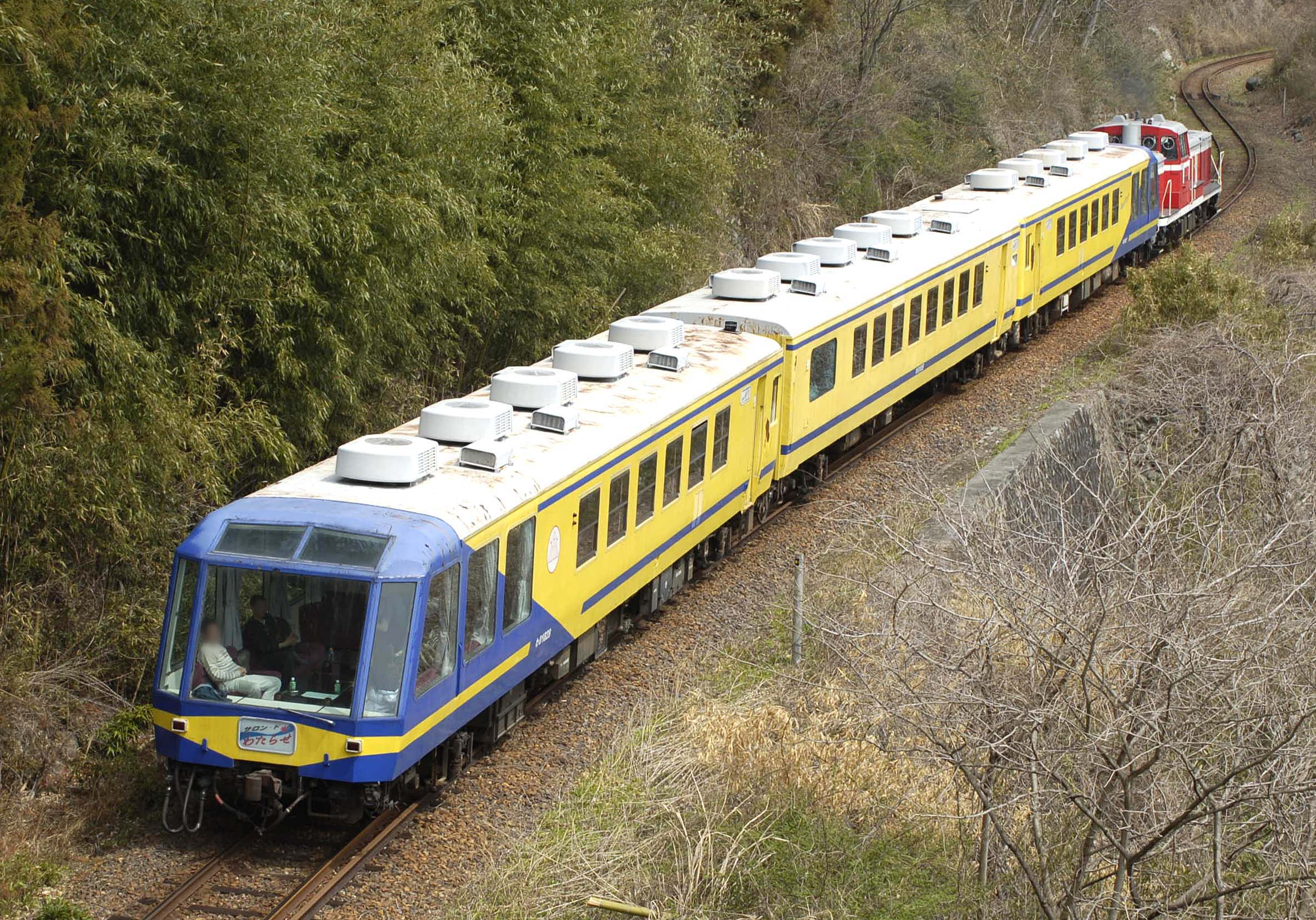 Watarase Keikoku Railway type Wa01 passenger car, "Salon de Watarase". わたらせ渓谷鐵道 わ01形客車｢サロン･ド･わたらせ｣(元JR東日本｢やすらぎ｣)。小中-神戸間にて、後追いで撮影。